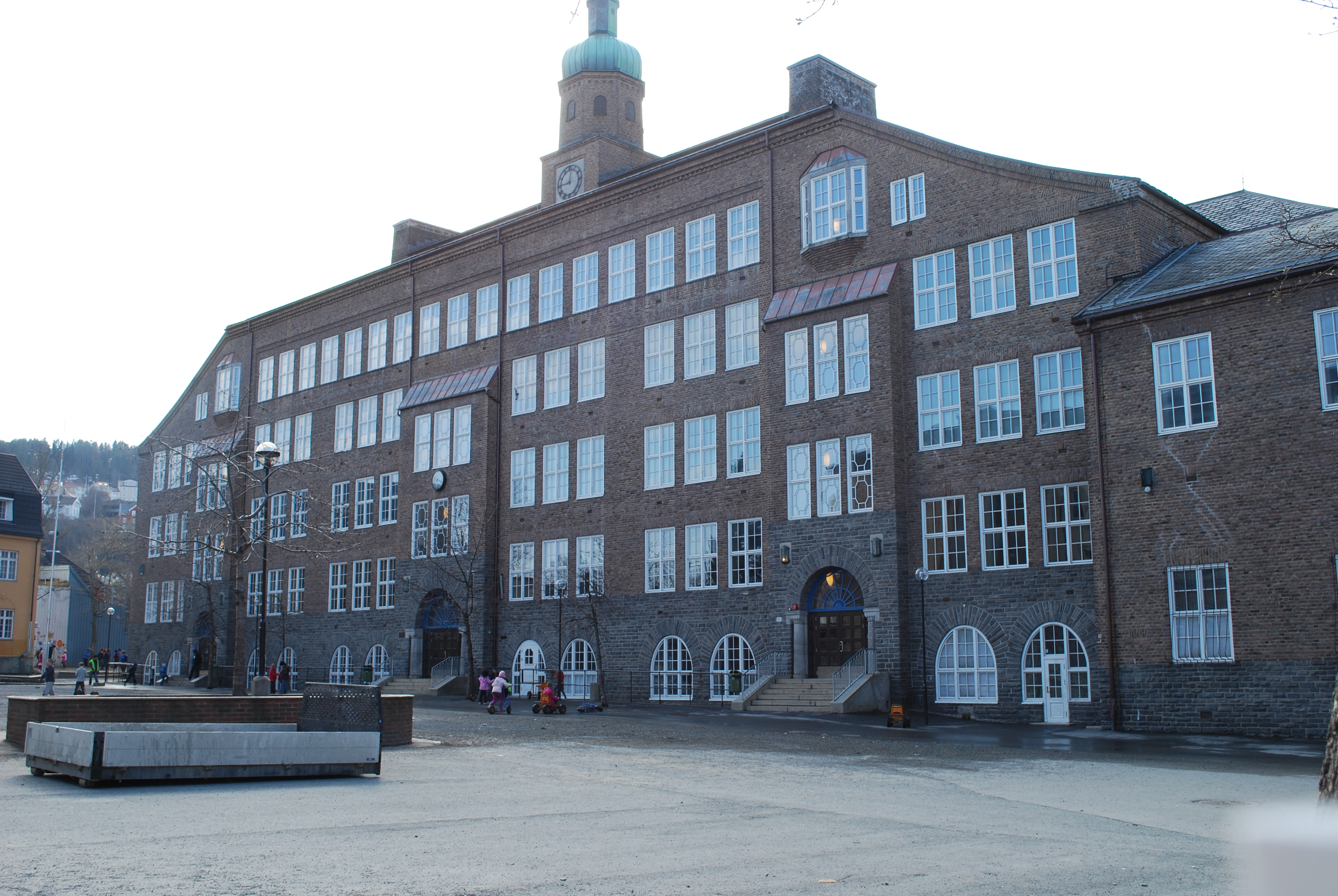 Ila skole i Trondheim.